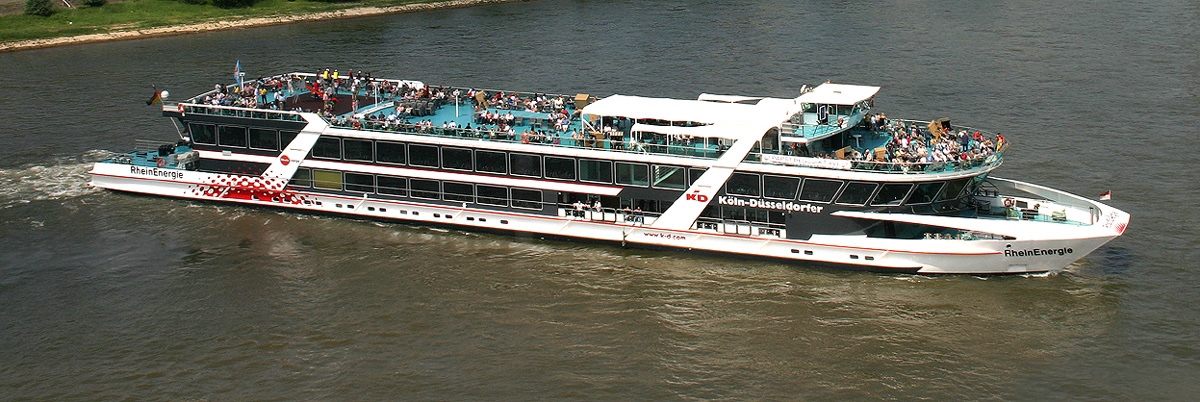 MS RheinEnergie, Rheinschiff der Köln-Düsseldorfer. Bekannt geworden, als Papst Benedikt XVI darauf den Rhein befuhr